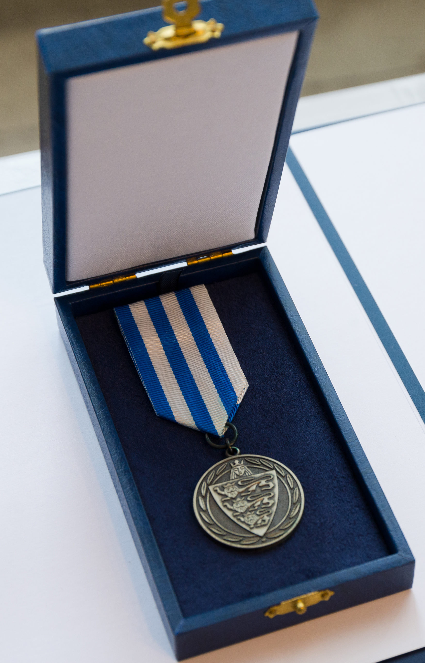 Tallinna raemedal